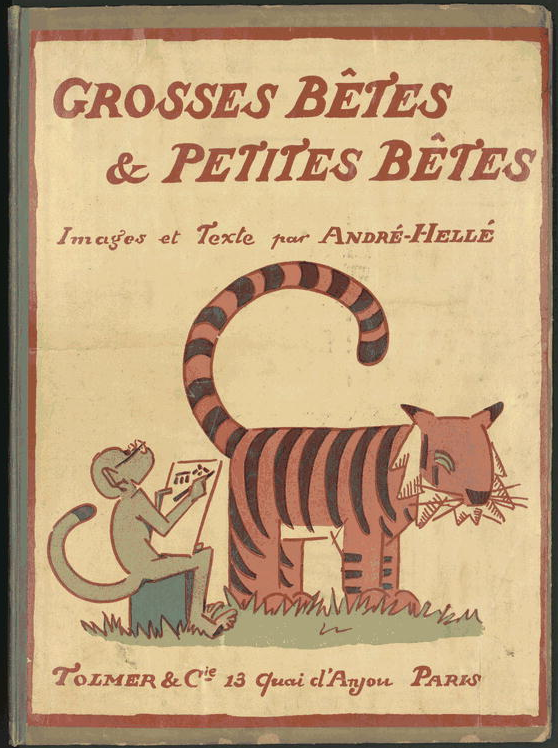 Book cover of Grosses bêtes et petites bêtes by André Hellé, published in Paris, Alfred Tolmer, 1912.